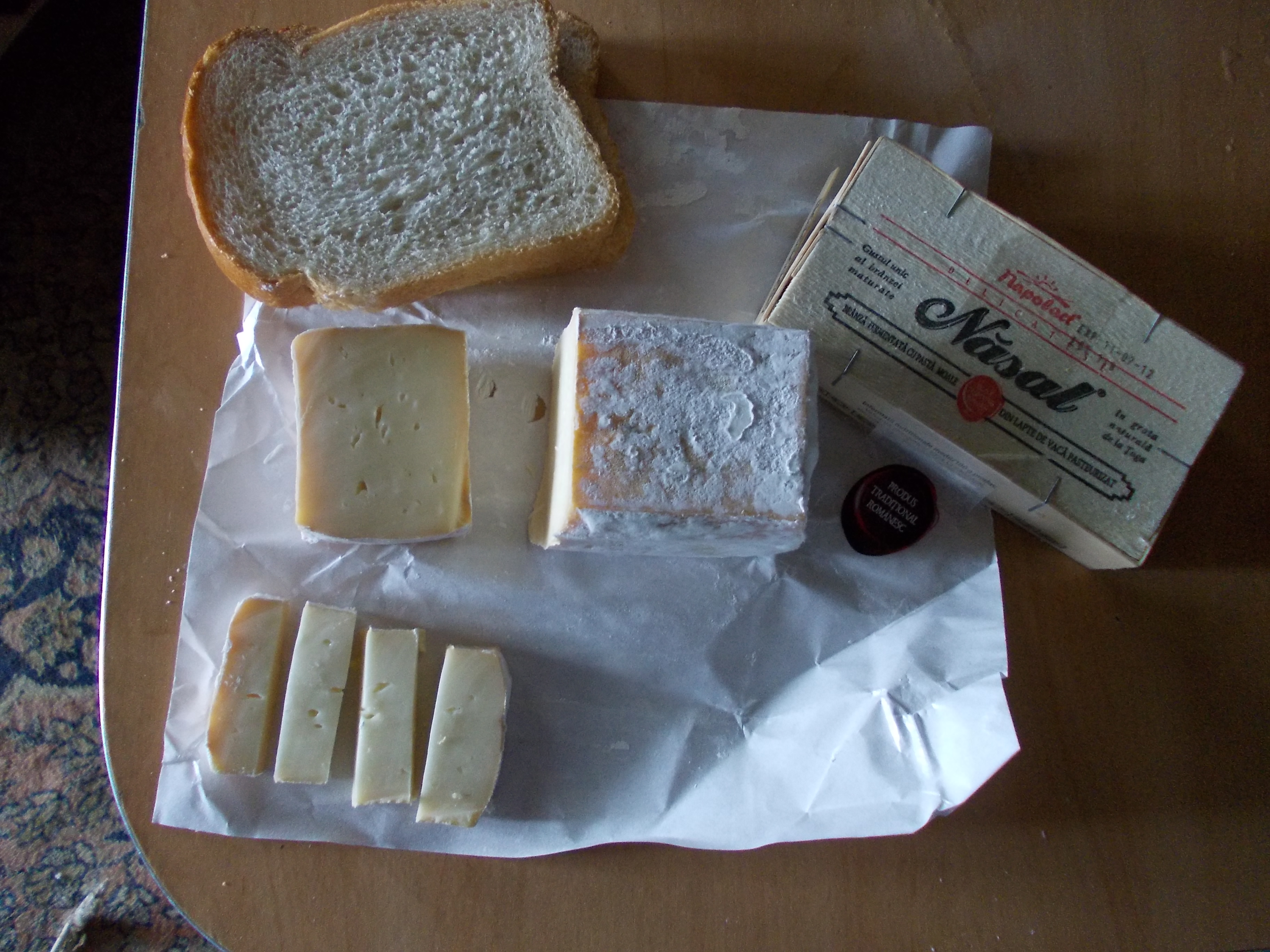 brânză Năsal de la Napolact